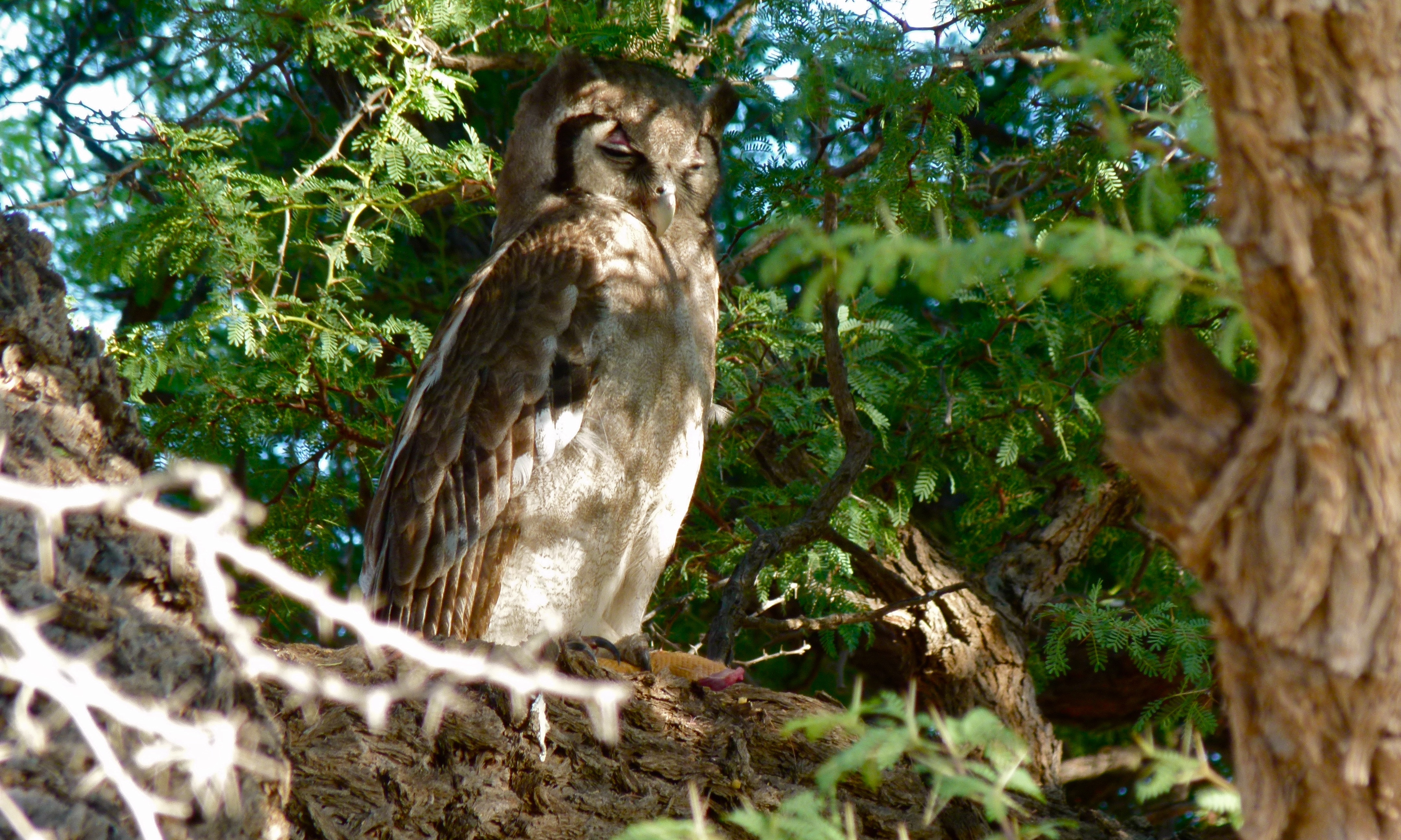 Auob Riverbed, Kgalagadi Transfrontier Park, SOUTH AFRICA